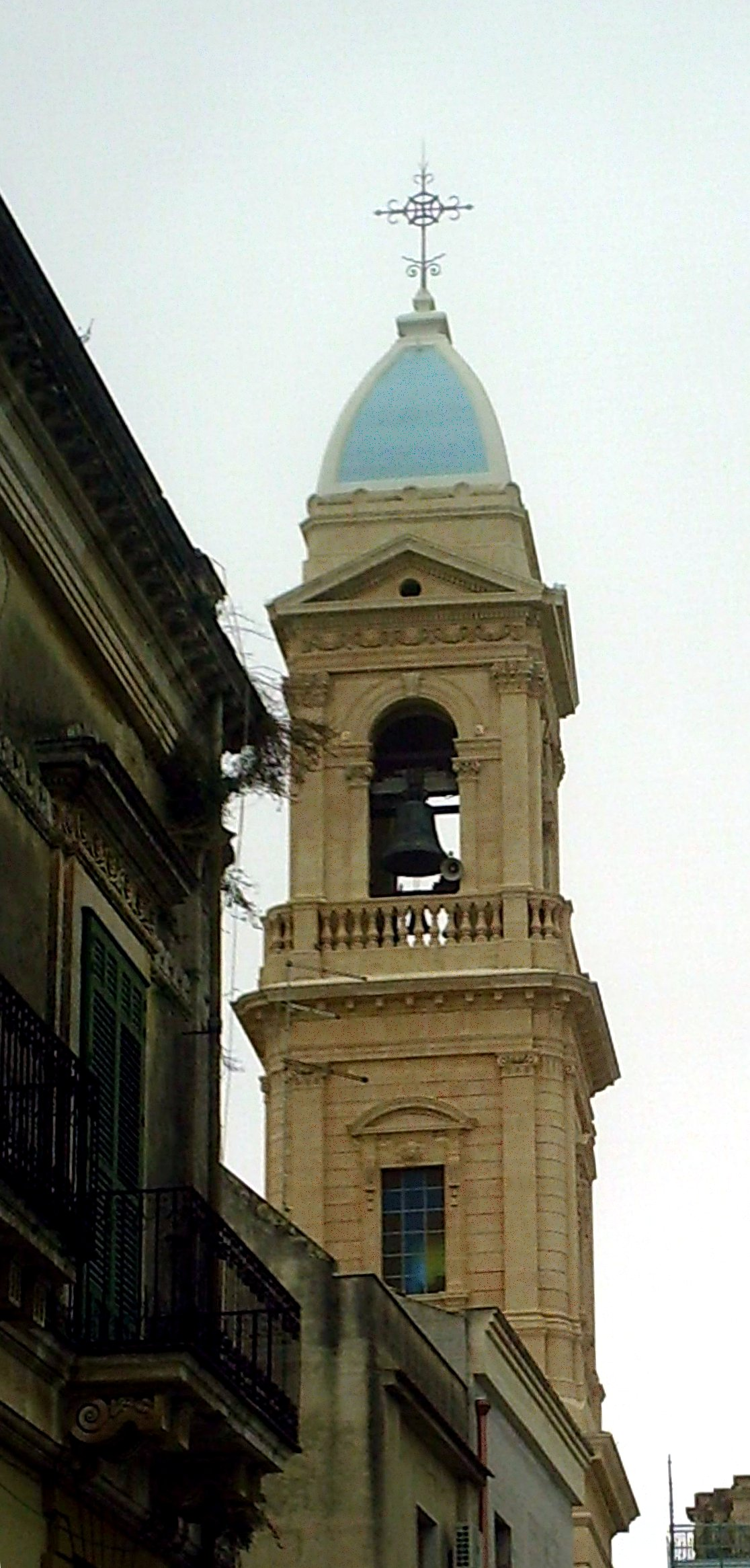 Particolare Campanile della SS Annunziata Ispica